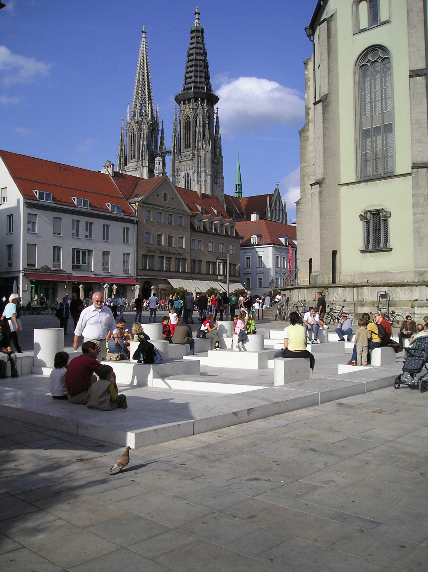 begehbares Bodenrelief "Misrach" von Dani Karavan auf dem Regensburger Neupfarrplatz (Regensburg, Bavaria, Germany)